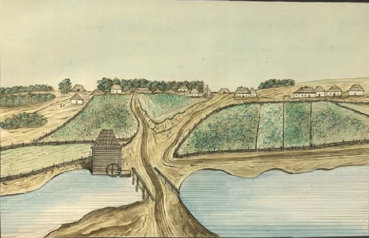 Жорнівка. Домінік П'єр де ля Фліз. «Медико-топографічний опис державних маєтностей Київської округи з зображенням деяких природних витворів рослинного і тваринного світу, разом із статистикою кожного села, їхнім виглядом, зробленим з натури, зображенням селянських костюмів та географічною картою Київської округи». Київ, 1854. - с. 706